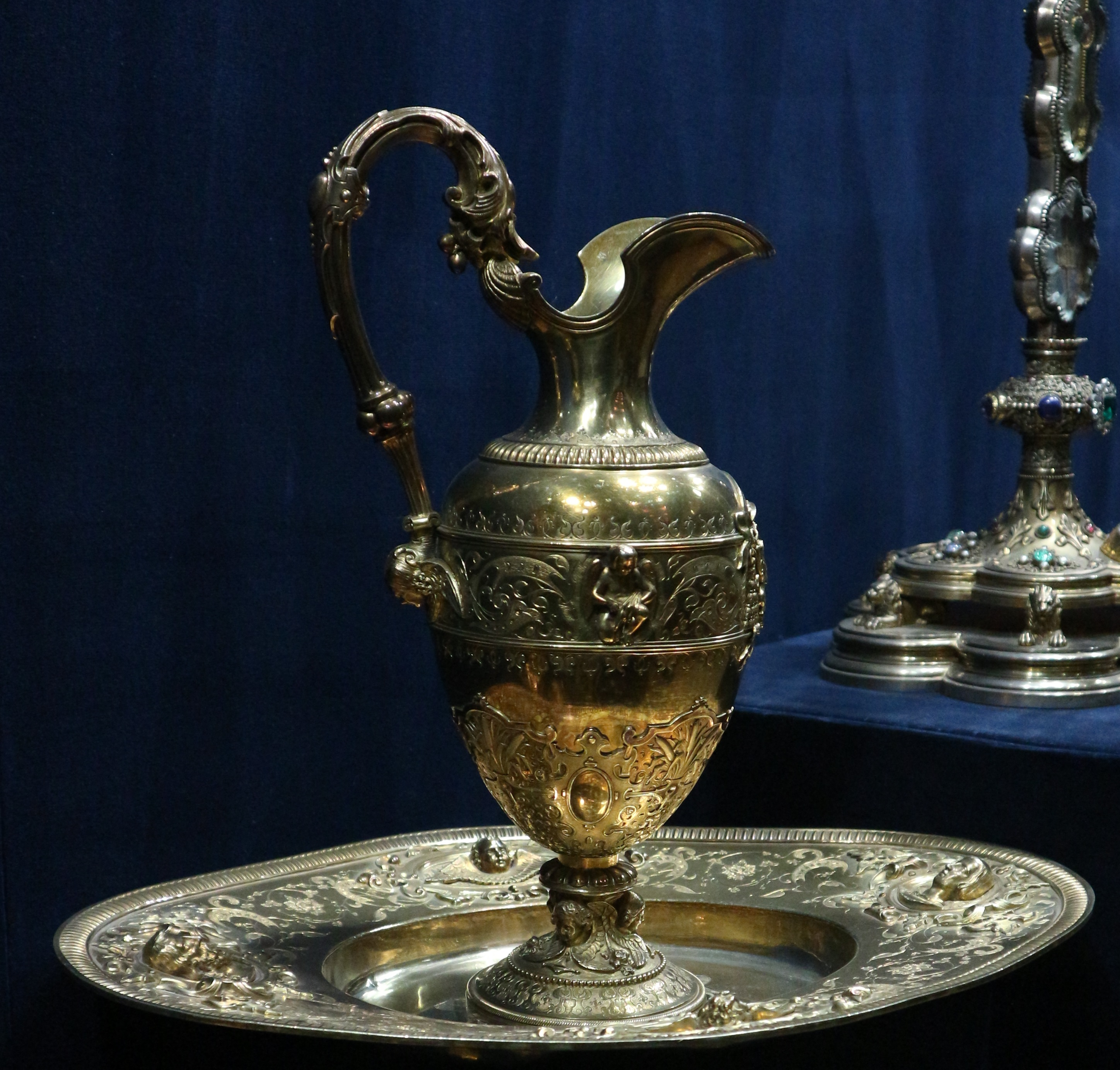 Argent doré, peint Don d'André Favier à la cathédrale Saint-Jean Baptiste en souvenir de son épouse et de leur fils. Cathédrale Saint-Jean Baptiste André Favier